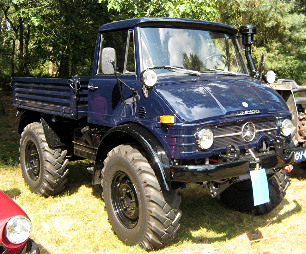 Vliegfeld Weelde, 21ste Oldtimer Festival des Historische Machineclubs Kempen, dunkelblauer Unimog 406.